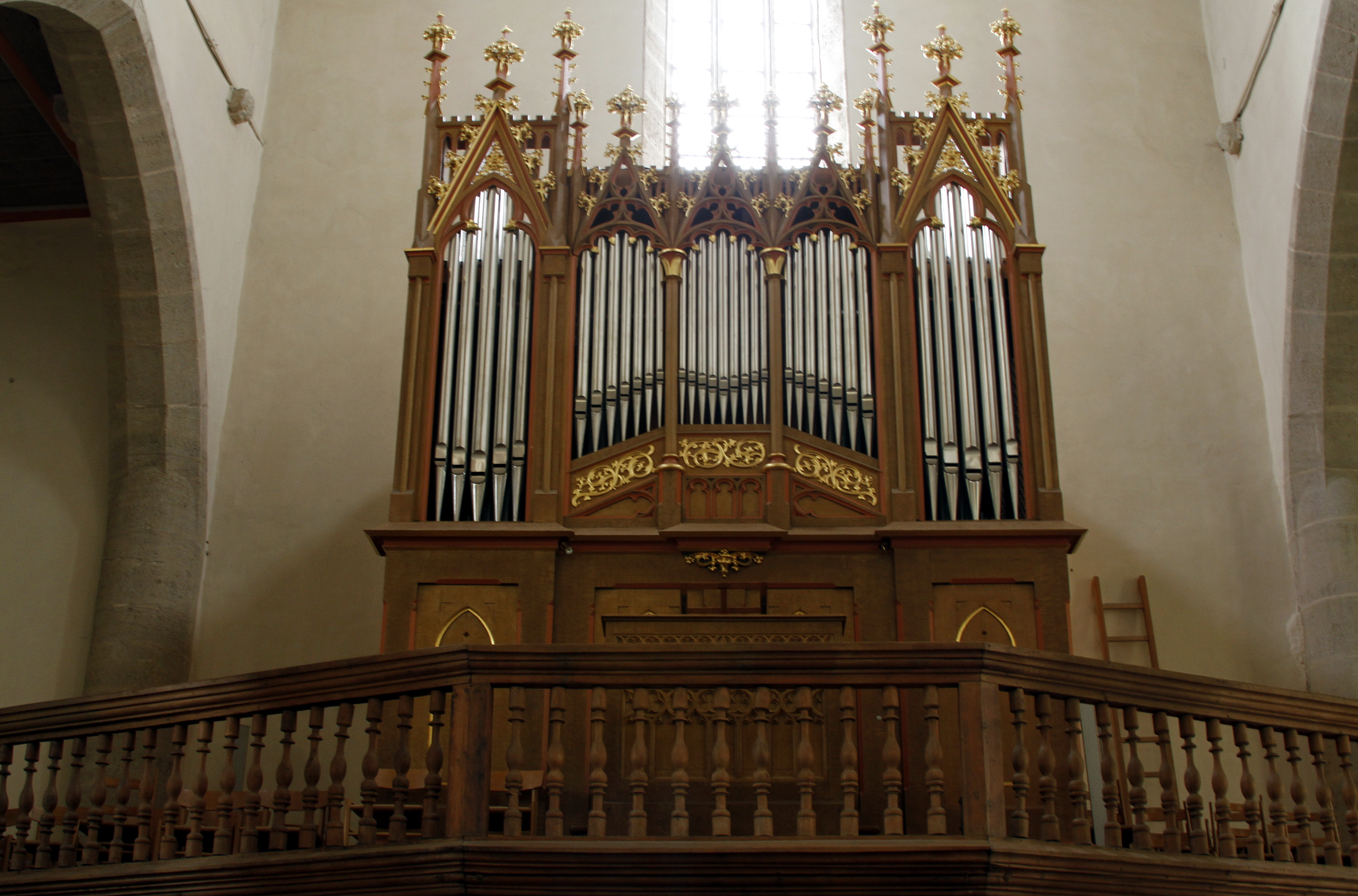 Franziskanerkirche - Rothenburg ob der Tauber - Germany